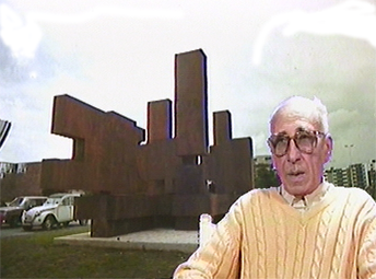 Portrait de Marino Di Teana devans l'entrée du campus Croix-Rouge de Reims.